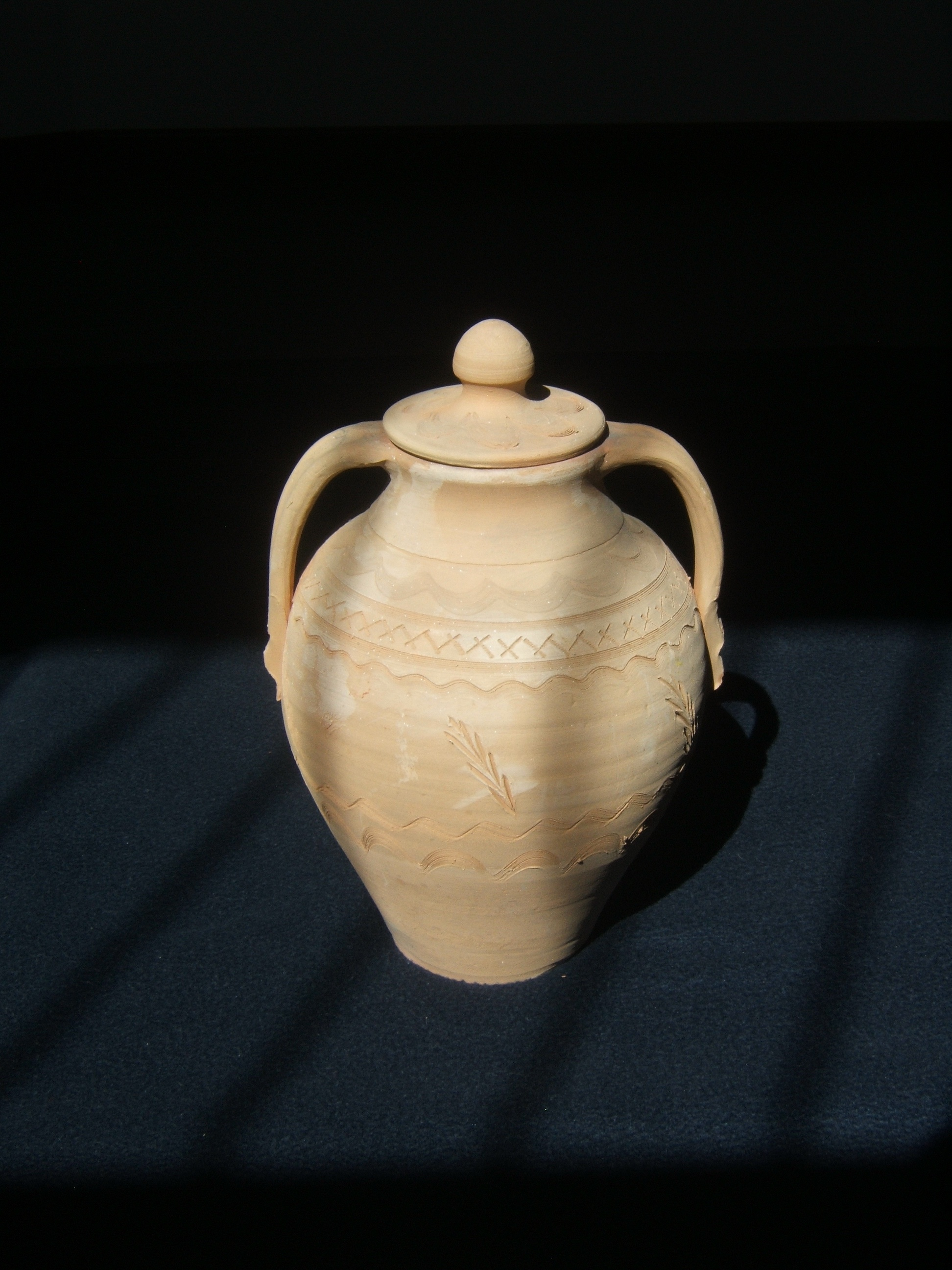 Orza con tapa sin vidriar, decoración incisa con dibujos geométricos y vegetales (esgrafiados). Alfarería de basto de la provincia de Toledo. Probable: El Puente del Arzobispo.Colección Fra.